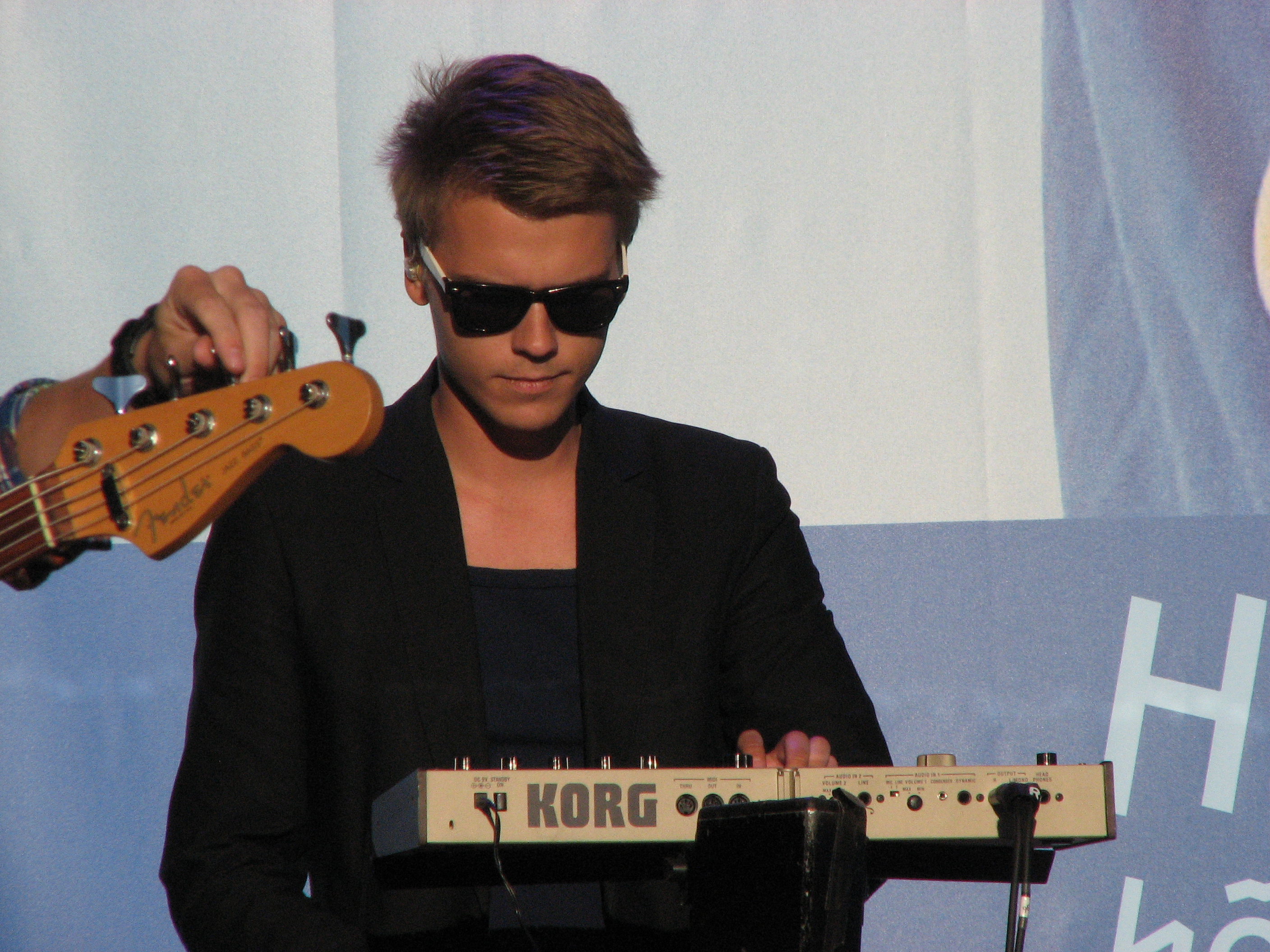 Tarvi Kull olümpiamedalistide tervituspeol Ott Leplandi taustabändis